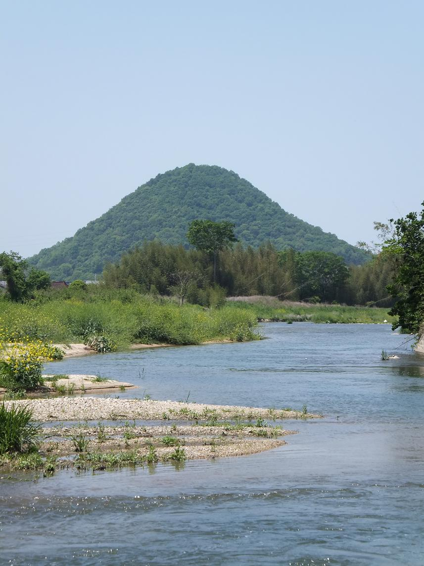 綾川町北で撮影した綾川と羽床富士（堤山）